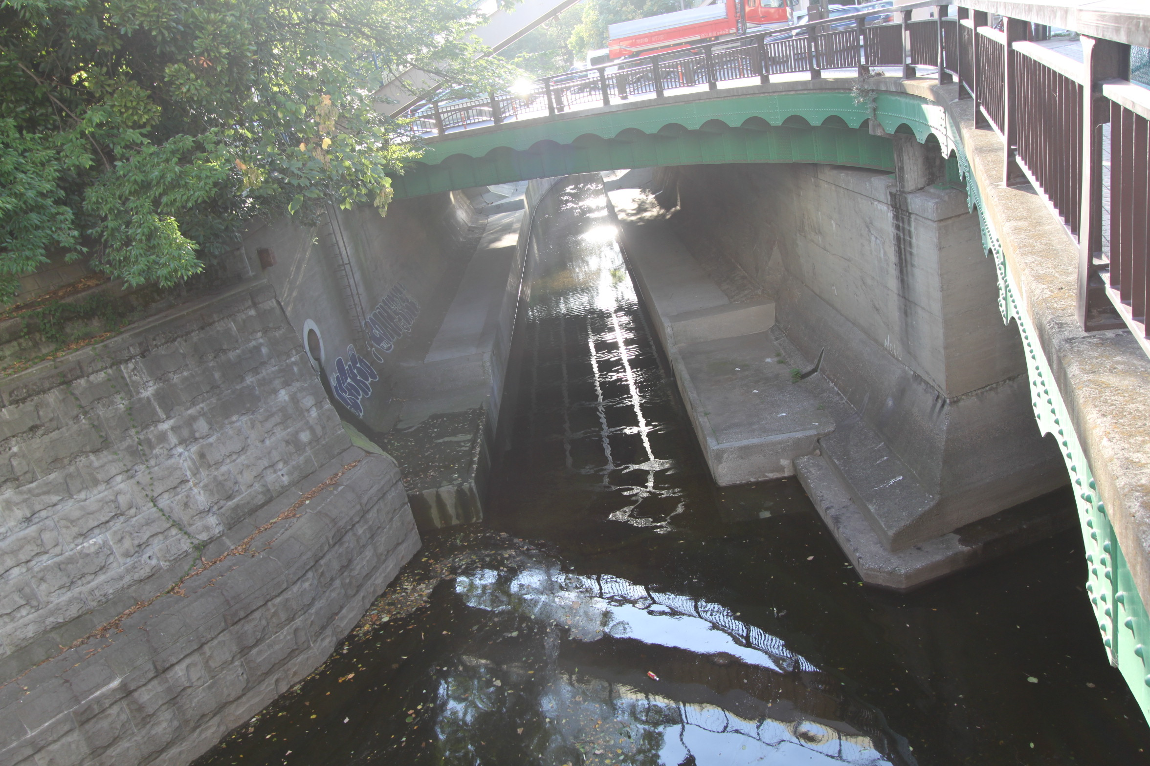 天現寺橋は画面上の方。天現寺橋の下は渋谷川。画面下の方が古川。画面右に笄川の合流点が見える。